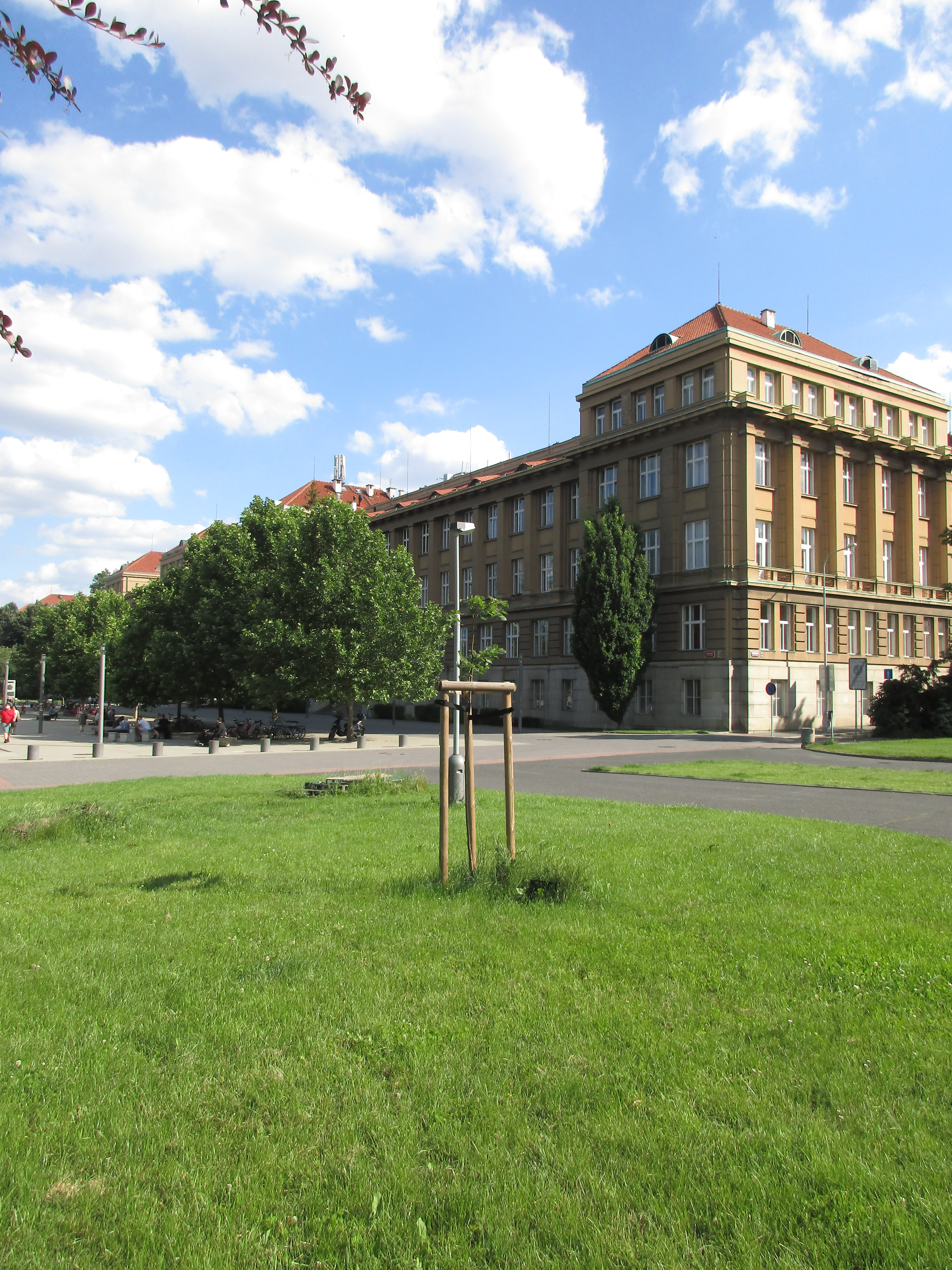 Lípa velkolistá (Tilia platyphyllos Scop.). Praha 6 - Dejvice. Vysazena 24. října 2018 na památku 100. výročí vzniku Československé republiky.